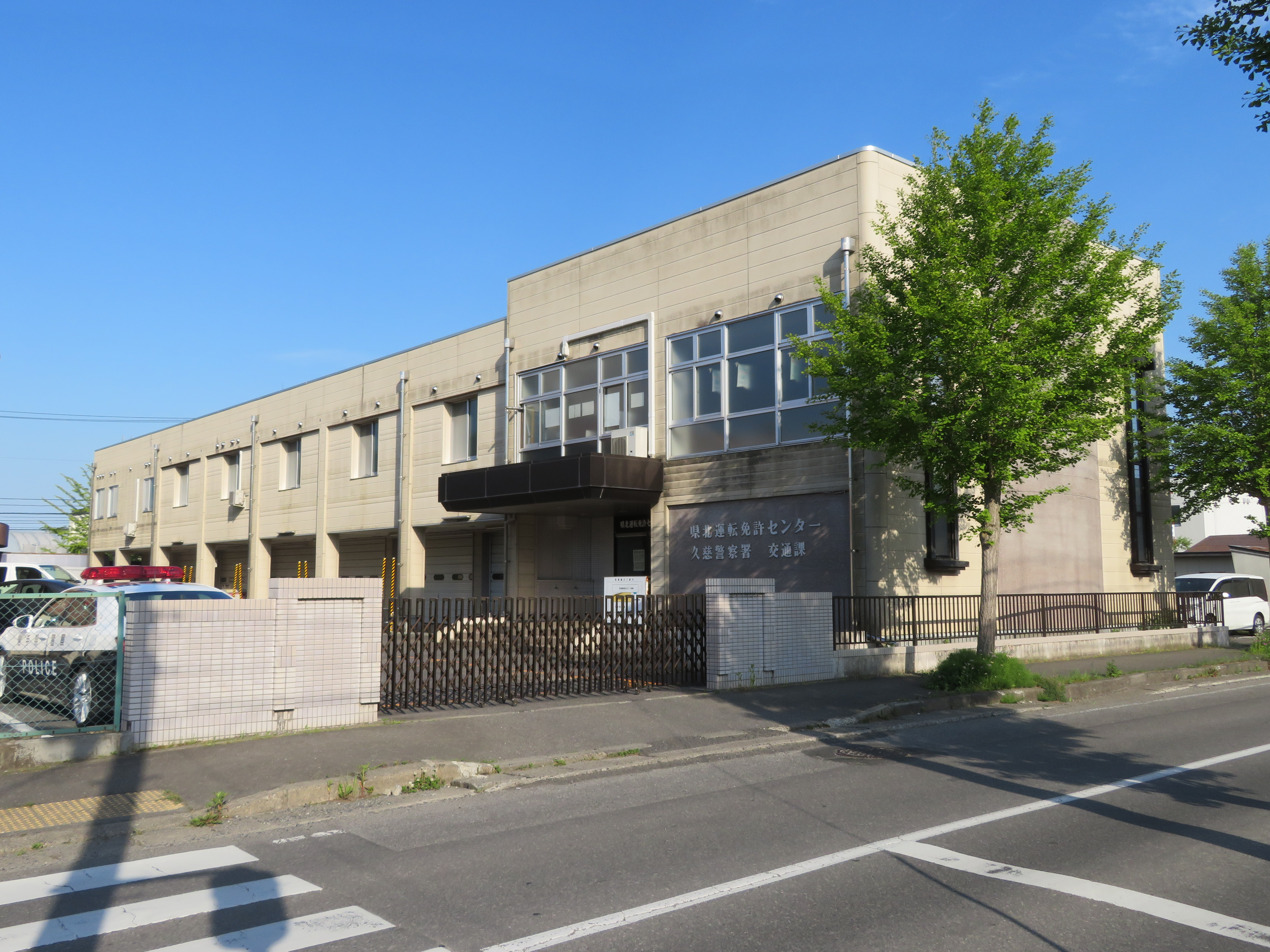 岩手県久慈市に所在する県北運転免許センターの庁舎 Canon PowerShot SX720 HS